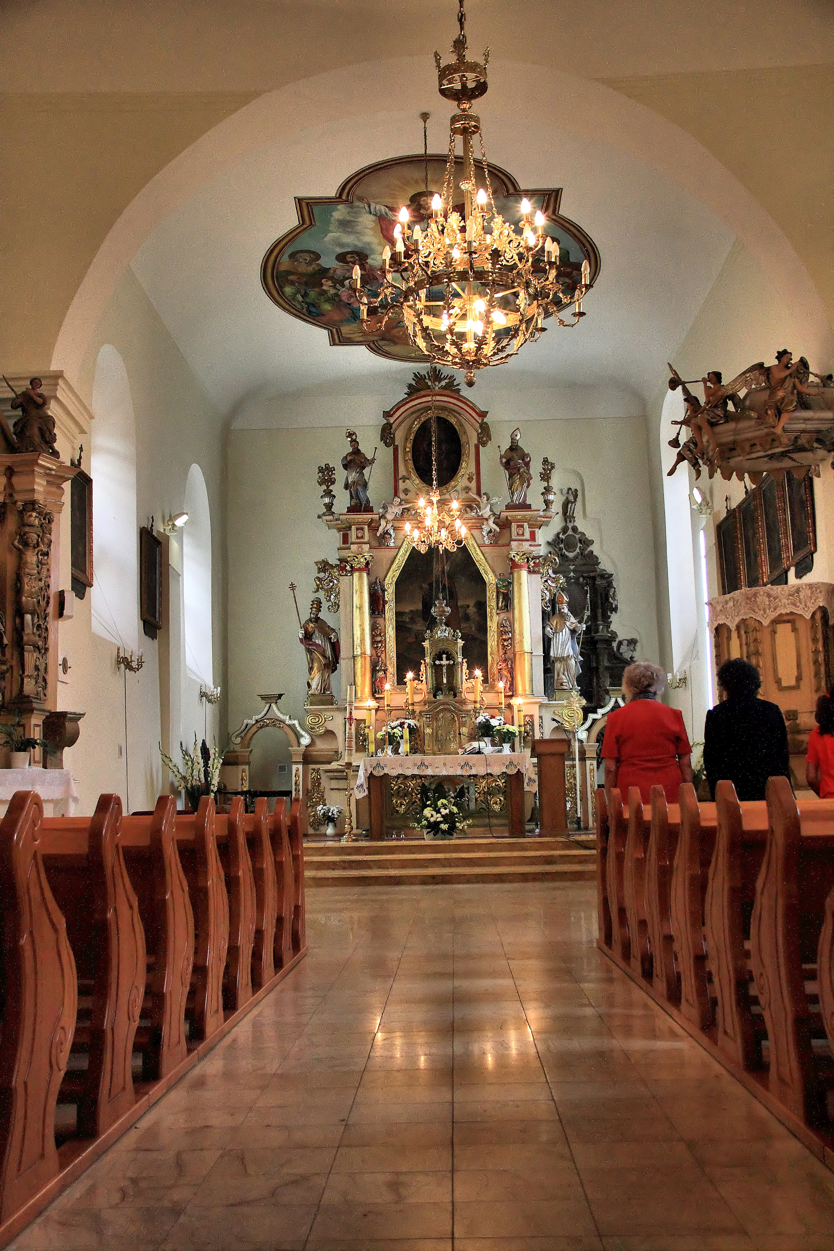 Grębocice - Kościół parafialny św. Marcina